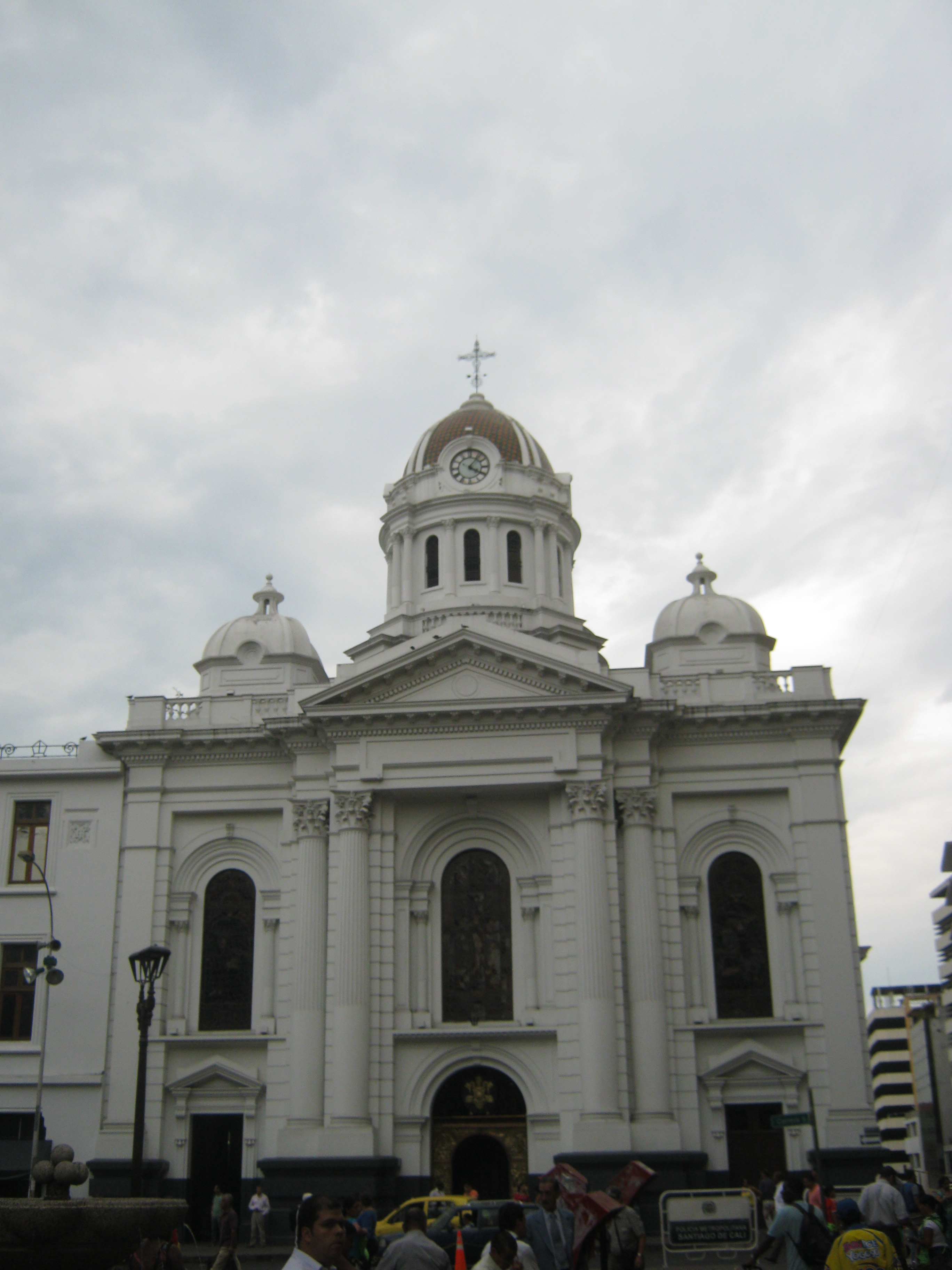 Iglesia Mayor de San Pedro en Cali. Monumento Nacional 30-017.